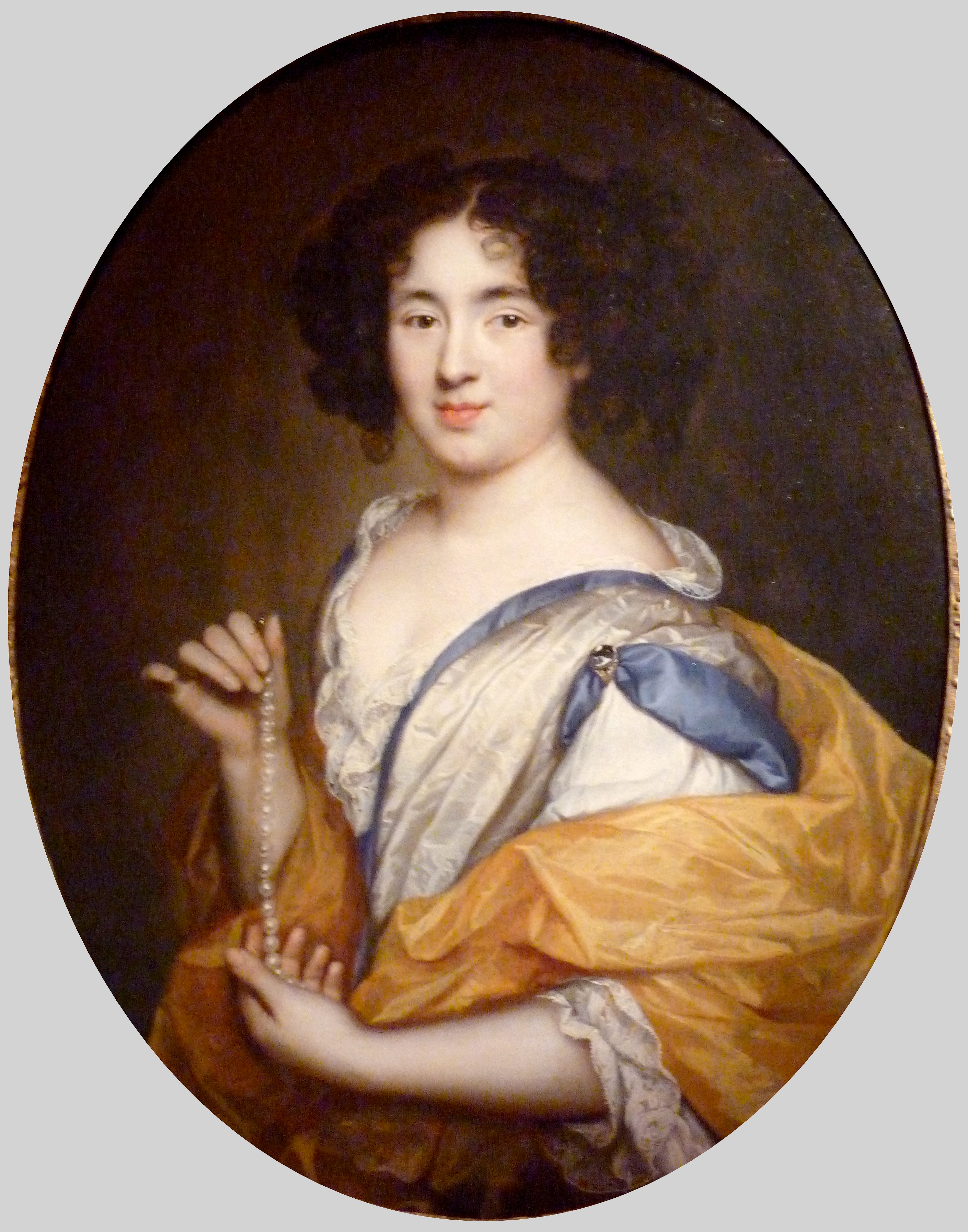 Portrait présumé de Marie Mancini (1639-1715).Collection particulière de Georges de Lastic (1927-1988) lors de l'exposition Le cabinet d'un amateur, n°27, au musée de la chasse et de la nature, Paris (décembre 2009-mars 2010).